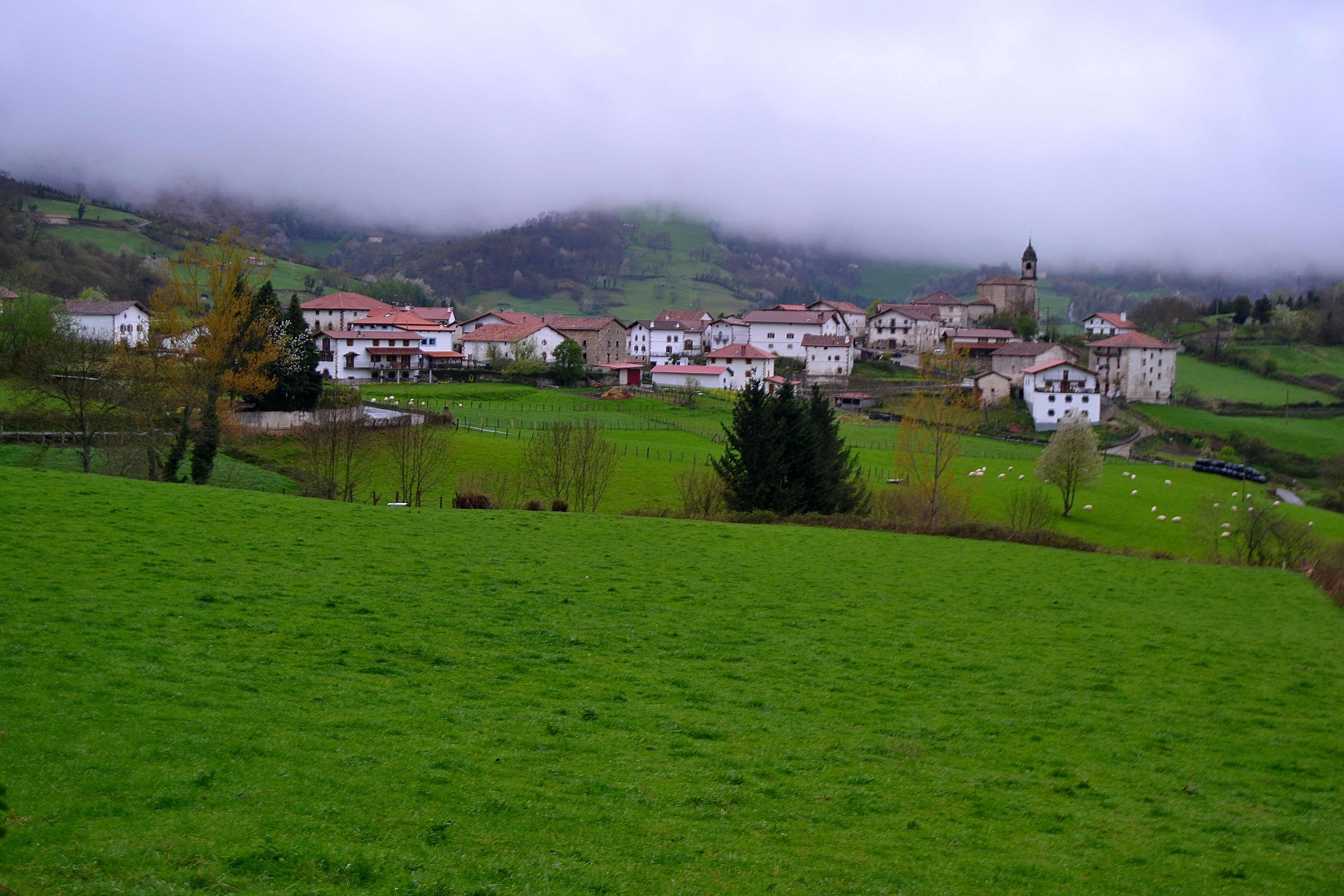 Beintza. Malerreka, Nafarroa. Euskal Herria. Beintza. Malerreka, Navarre. Basque Country.